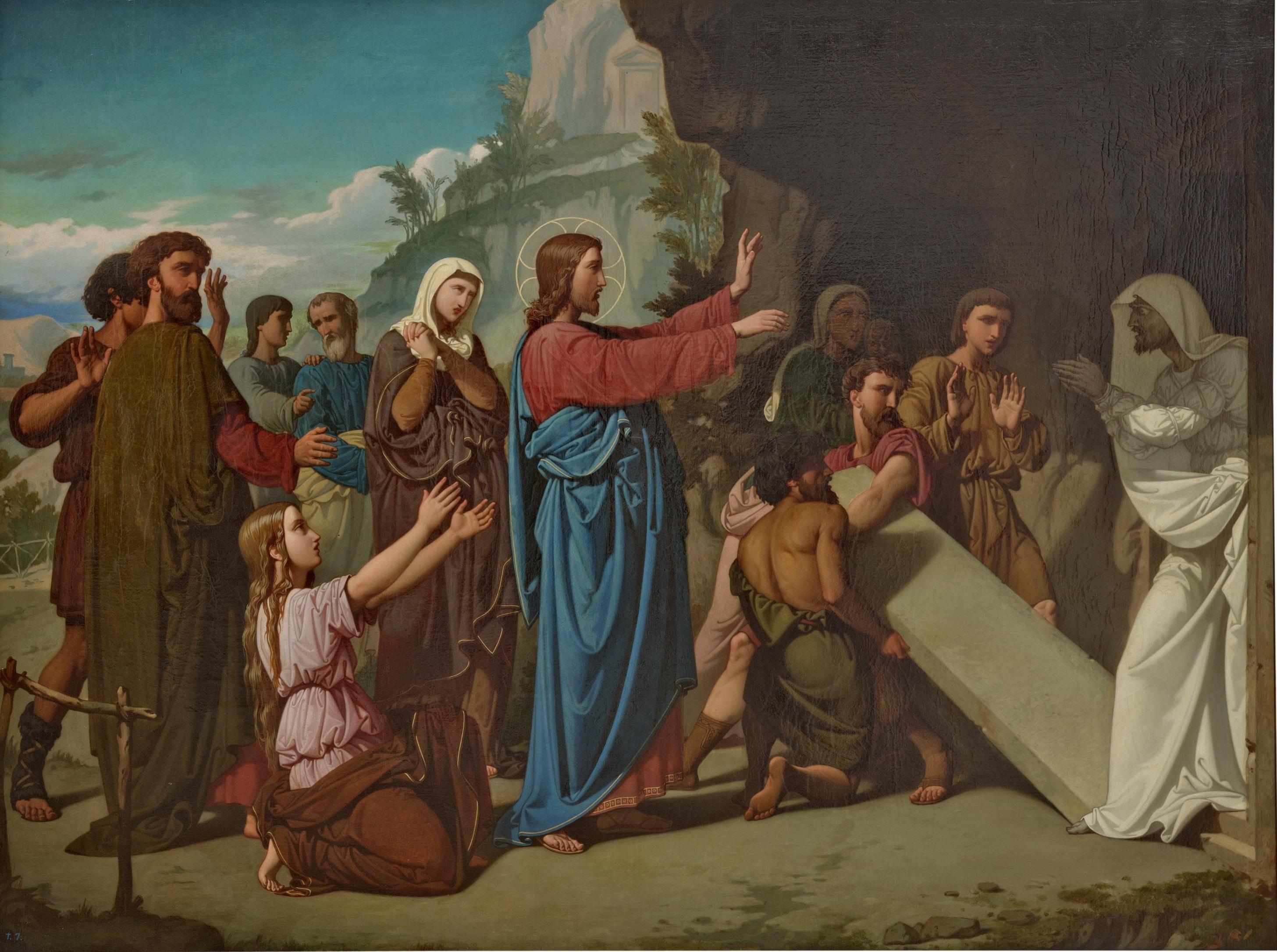 La obra representa el momento en que Jesucristo, según consta en los Santos Evangelios, resucitó a Lazaro de Betania de entre los muertos.